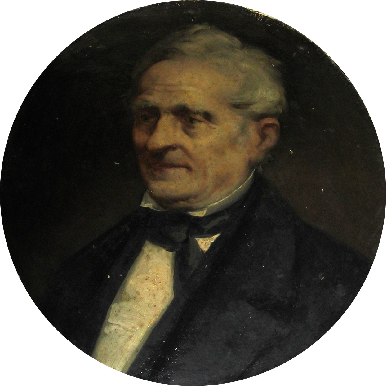 Ritratto di Pietro Paleocapa (1789-1869) conservato a Palazzo Pelliccioli, Alzano Lombardo, BG.